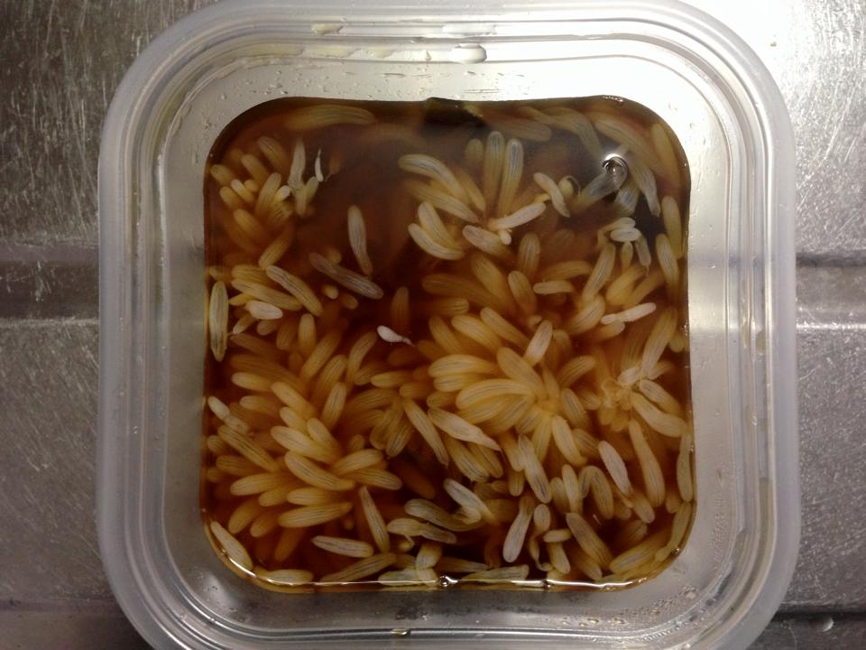 しょうゆ漬けしてあるところ